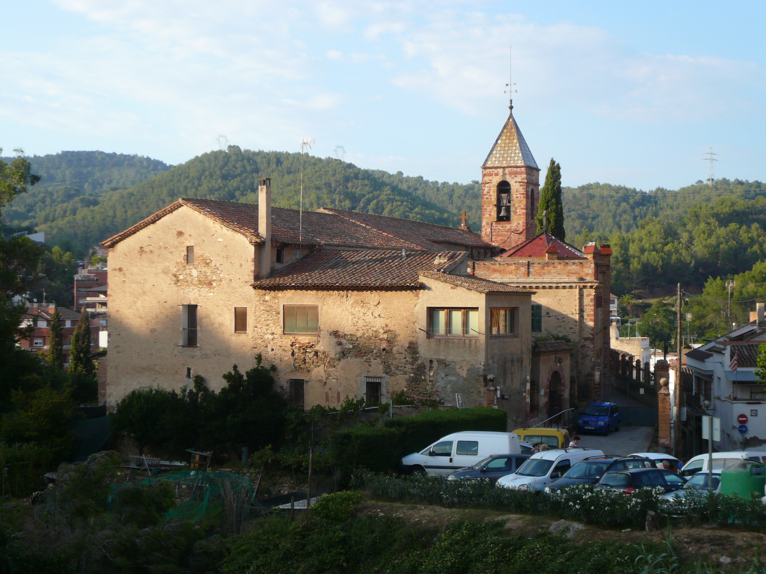 Església parroquial de Sant Climent. C. de l'Església (Sant Climent de Llobregat). Object location41° 20′ 10.53″ N, 1° 59′ 44.55″ E